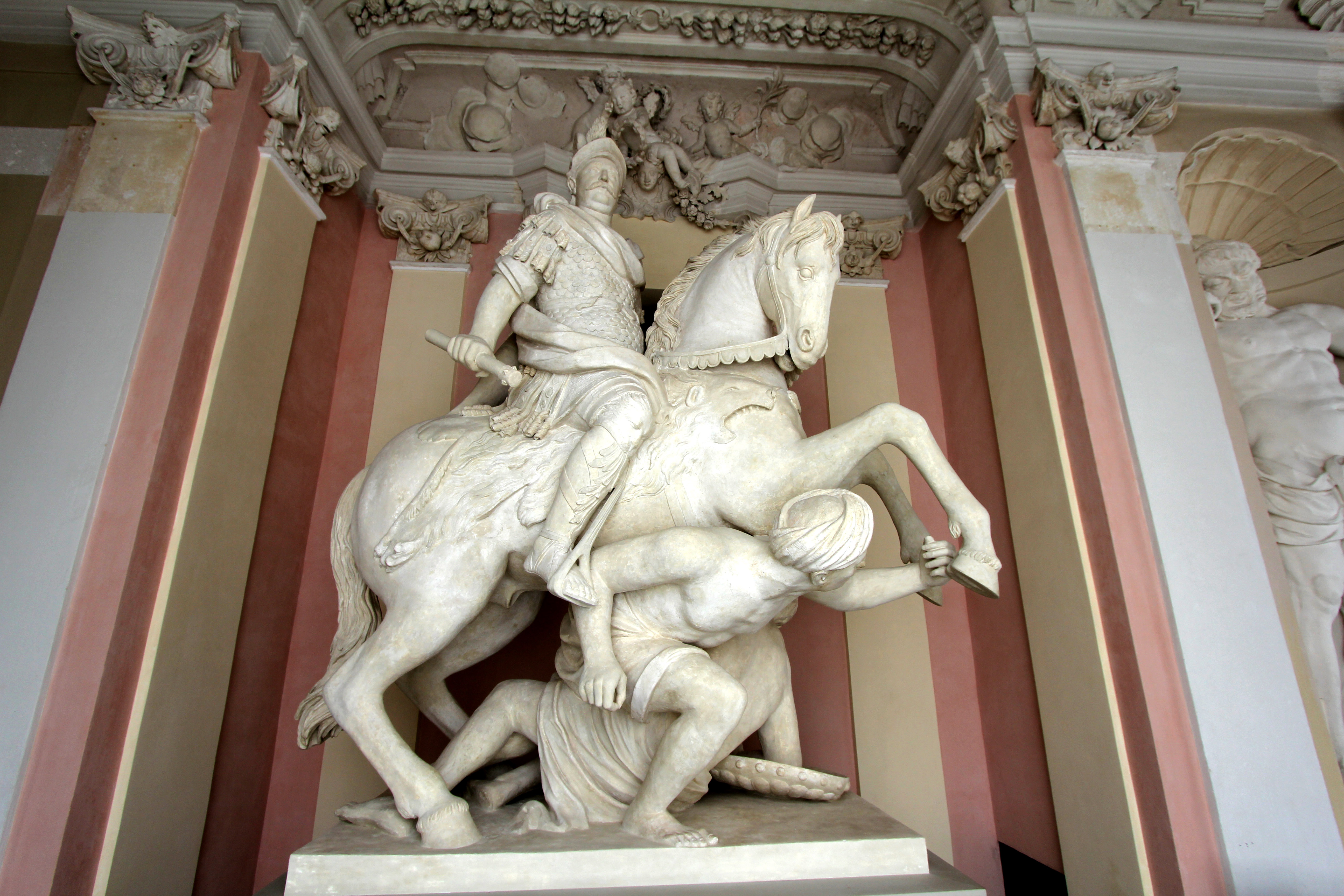 King John III. Sobieski monument by Andre Le Brun at Wilanów Palace